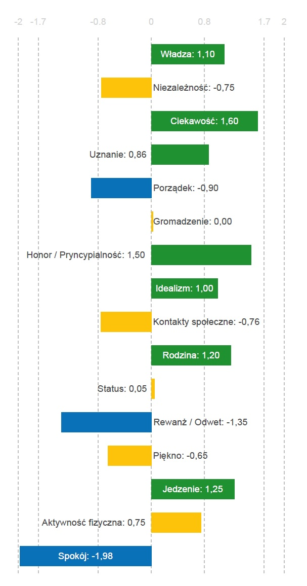 Na wykresie słupkowym pokazano jak kształtują się poszczególne wartości 16 motywatorów na skali -2 do 2